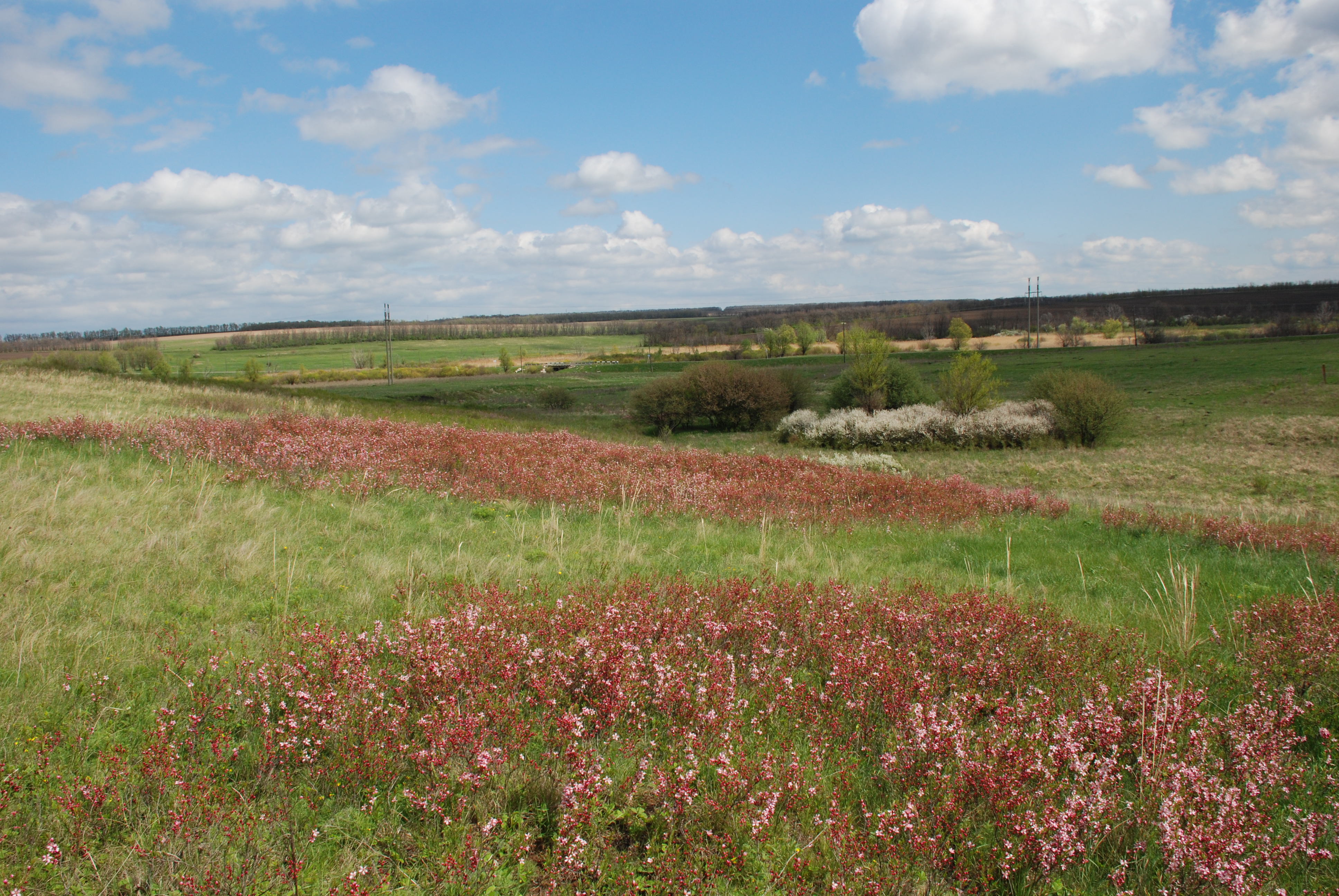 відділення «Стрільцівський степ», Міловський район с.Криничне